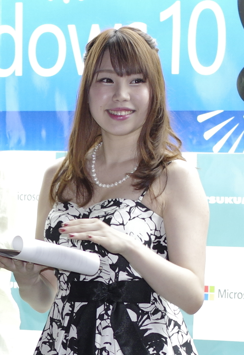 TSUKUMO eX. Windows 10 DSP版発売記念イベント 塚本舞